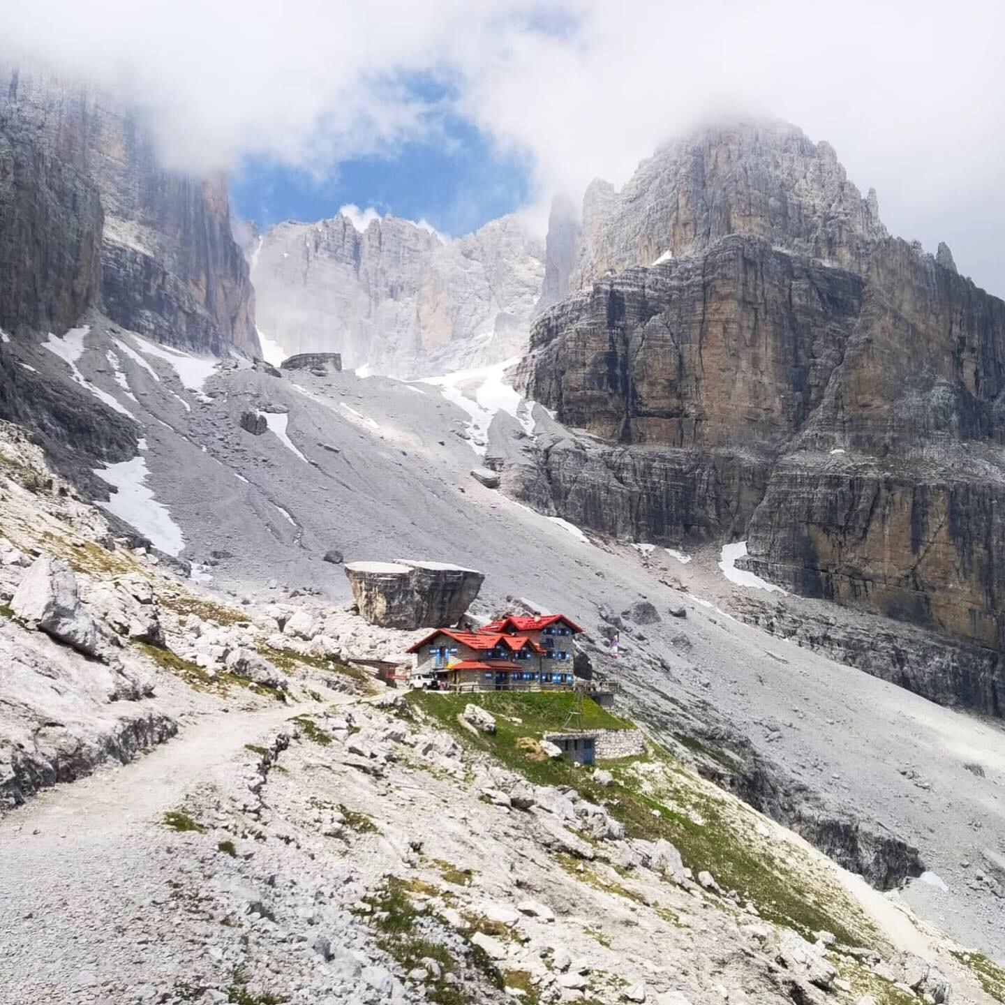 Val d'Ambiez nella Riserva di Biosfera Alpi Ledrensi e Judicaria